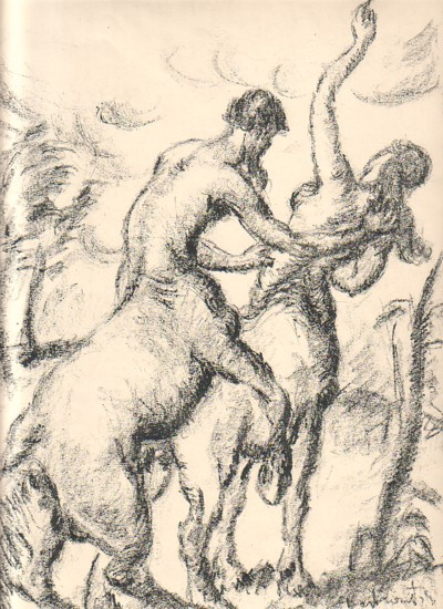 Gyula Derkovits: Two centaurs, making love